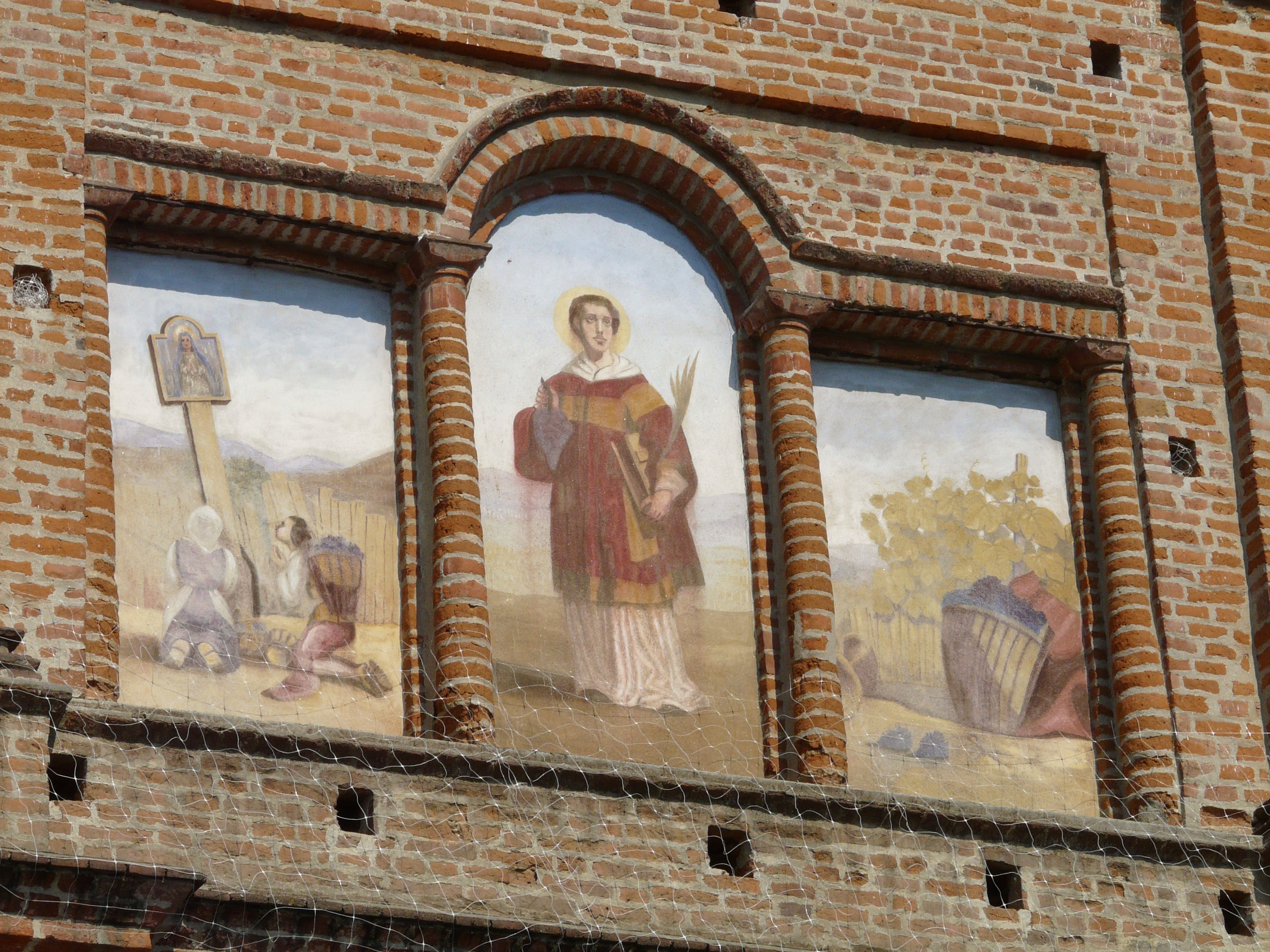 Chiesa di San Vincenzo, Mirabello Monferrato, Piemonte, Italia